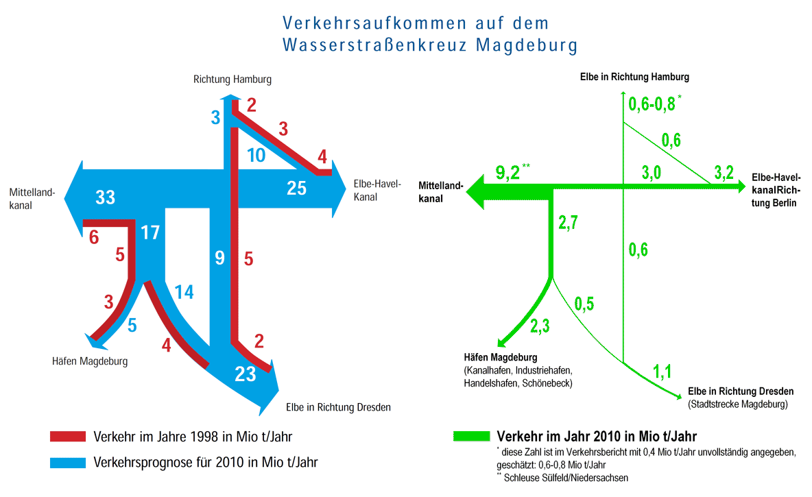 Wasserstraßenkreuz Magdeburg - Vergleich der für das Wasserstraßenkreuz für das Jahr 2010 prognostizierten Verkehrszahlen (links) mit den realen Verkehrszahlen nach Bau des Wasserstraßenkreuzes im Jahr 2010 (rechts), Angaben in Mio. Tonnen/Jahr. Zahlengrundlage: Schifffahrtsberichte des WSA Magdeburg.